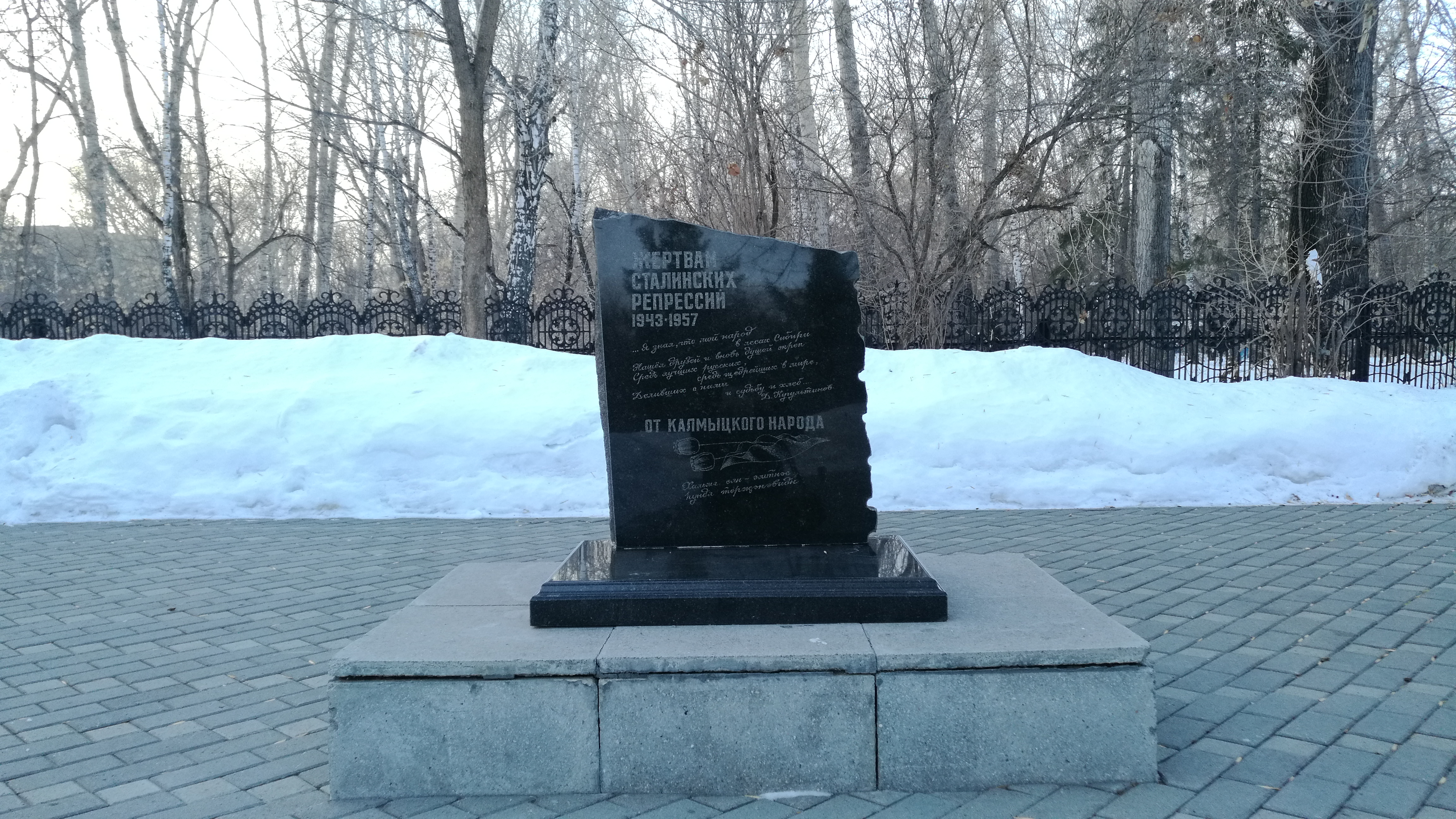 Monumento al deportitaj kalmukoj. Tjumeno, Rusio.